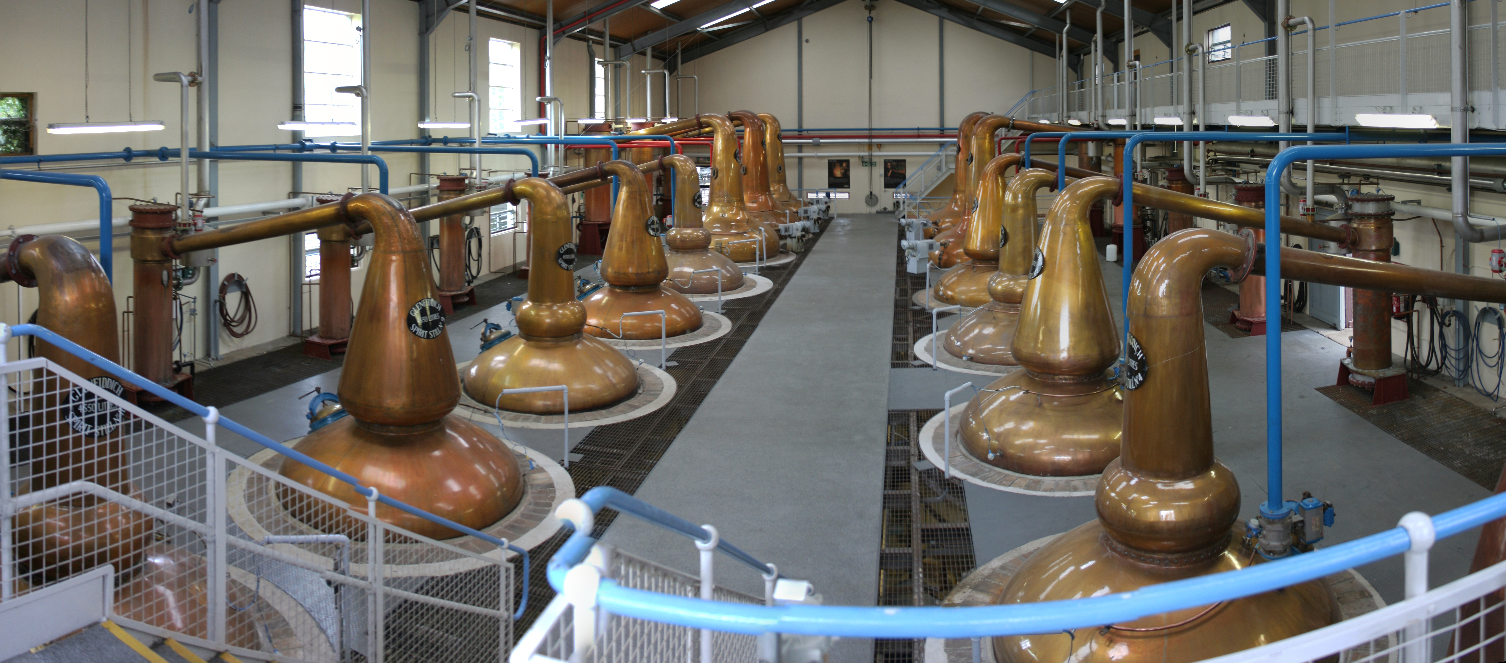 Visite de la distillerie de wisky Glenfiddich